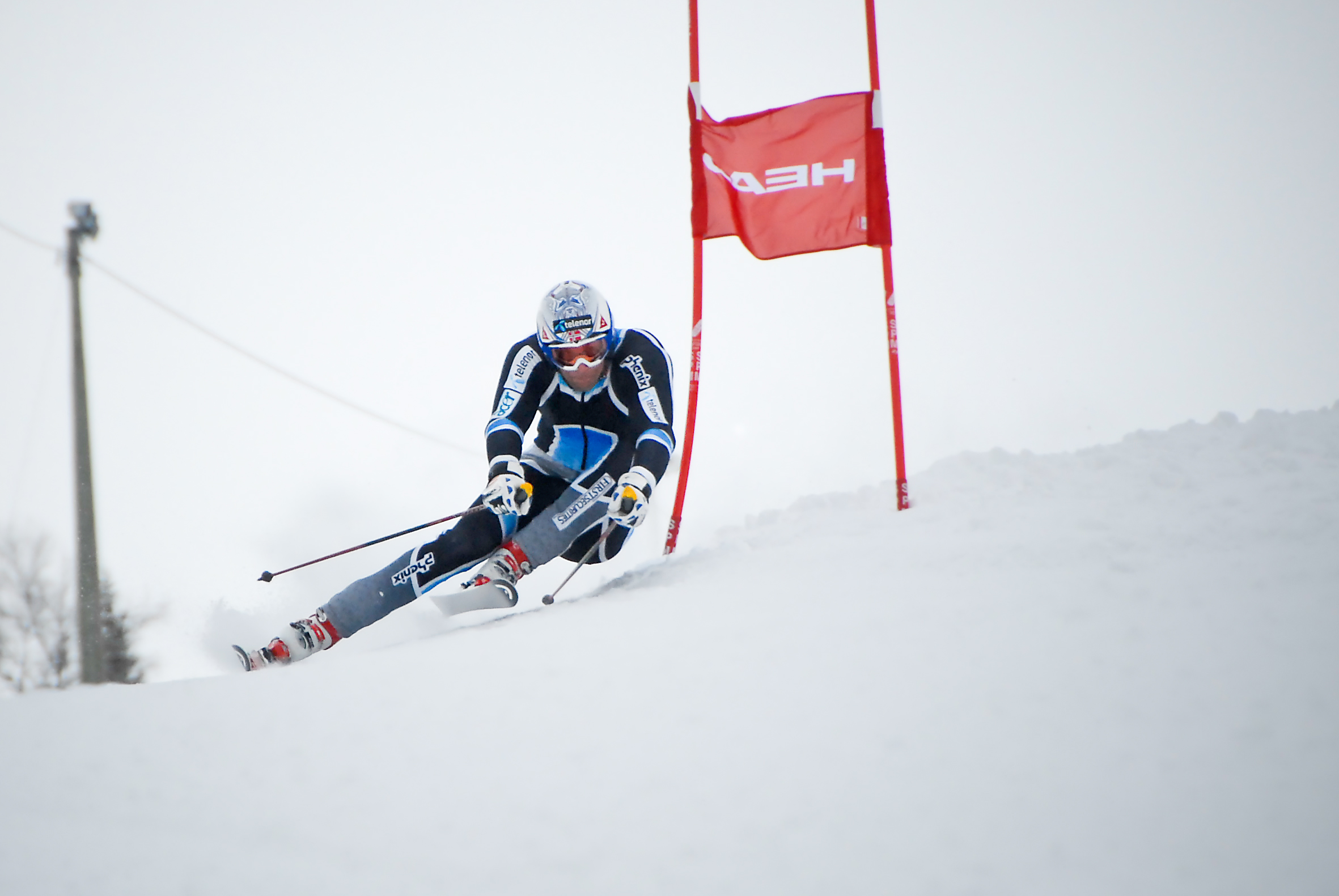 Aksel Lund Svindal trener i Høgegga Renn- og Treningssenter i Trysil. Foto: Ola Matsson